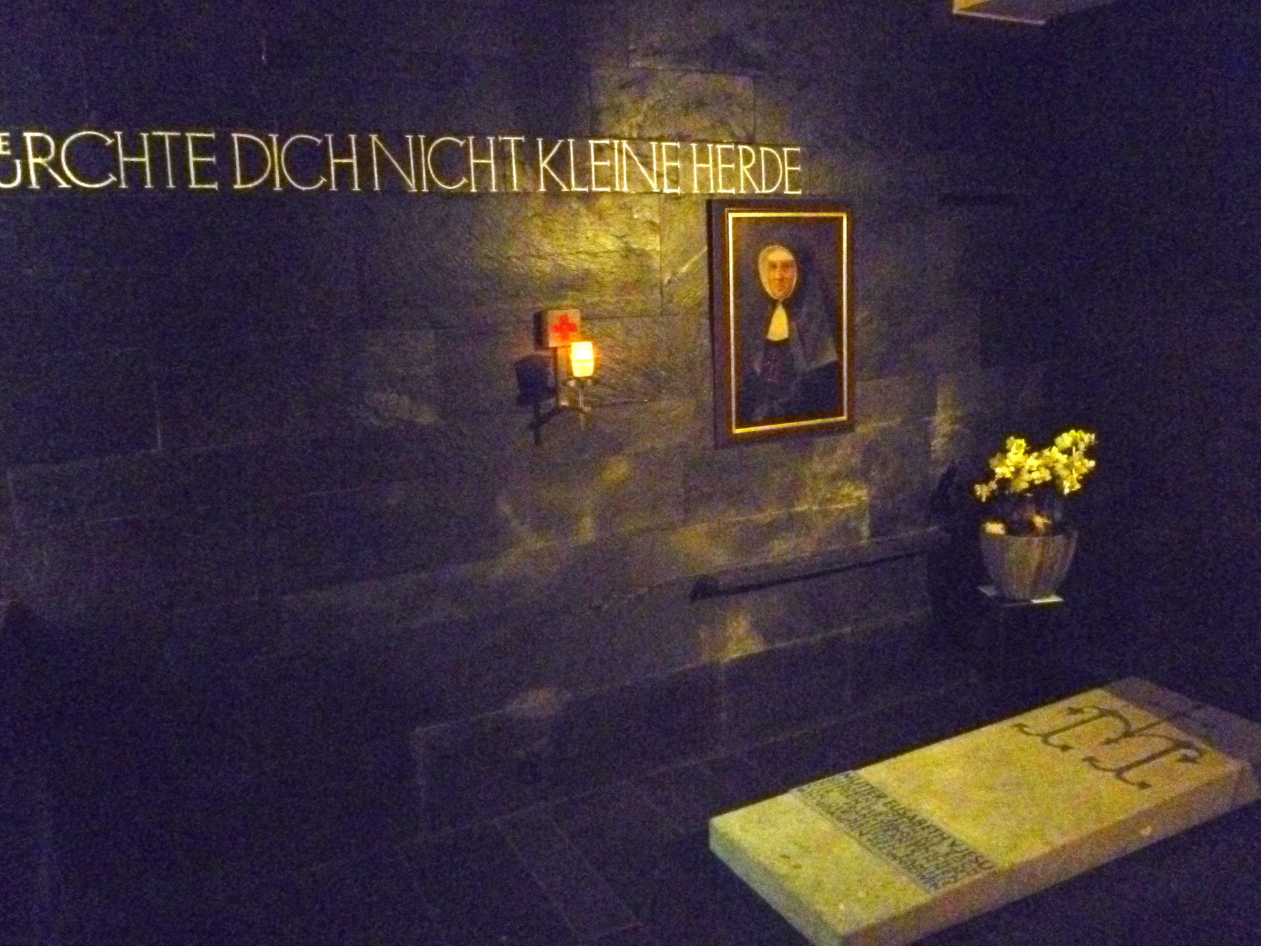 Grabstätte der Mutter Elisabeth von Jesu im Klösterchen Eupen, Generaloberin der Franziskanerinnen von der Heiligen Familie